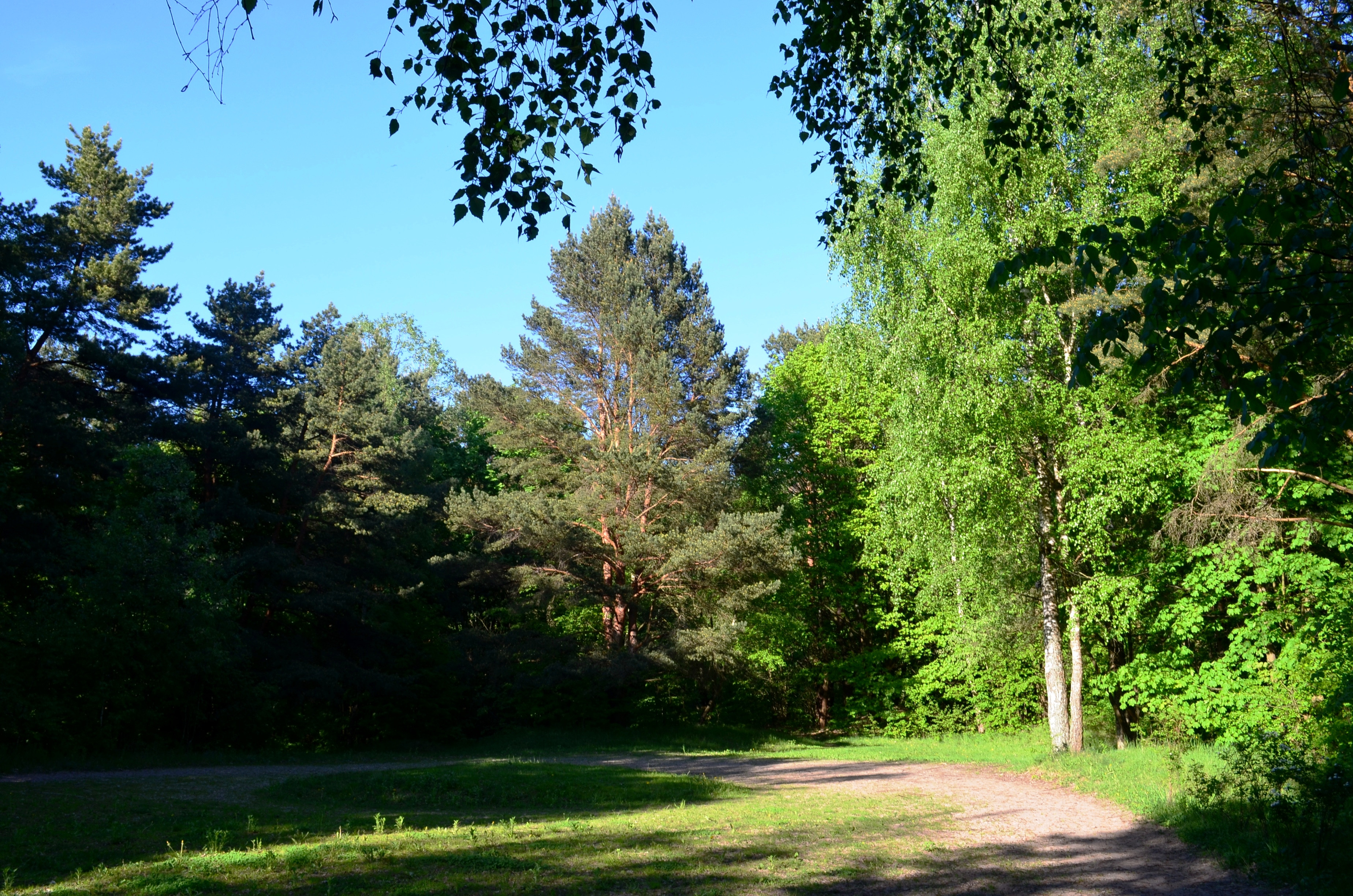 Belmonto botaninis-zoologinis draustinis, Vilnius